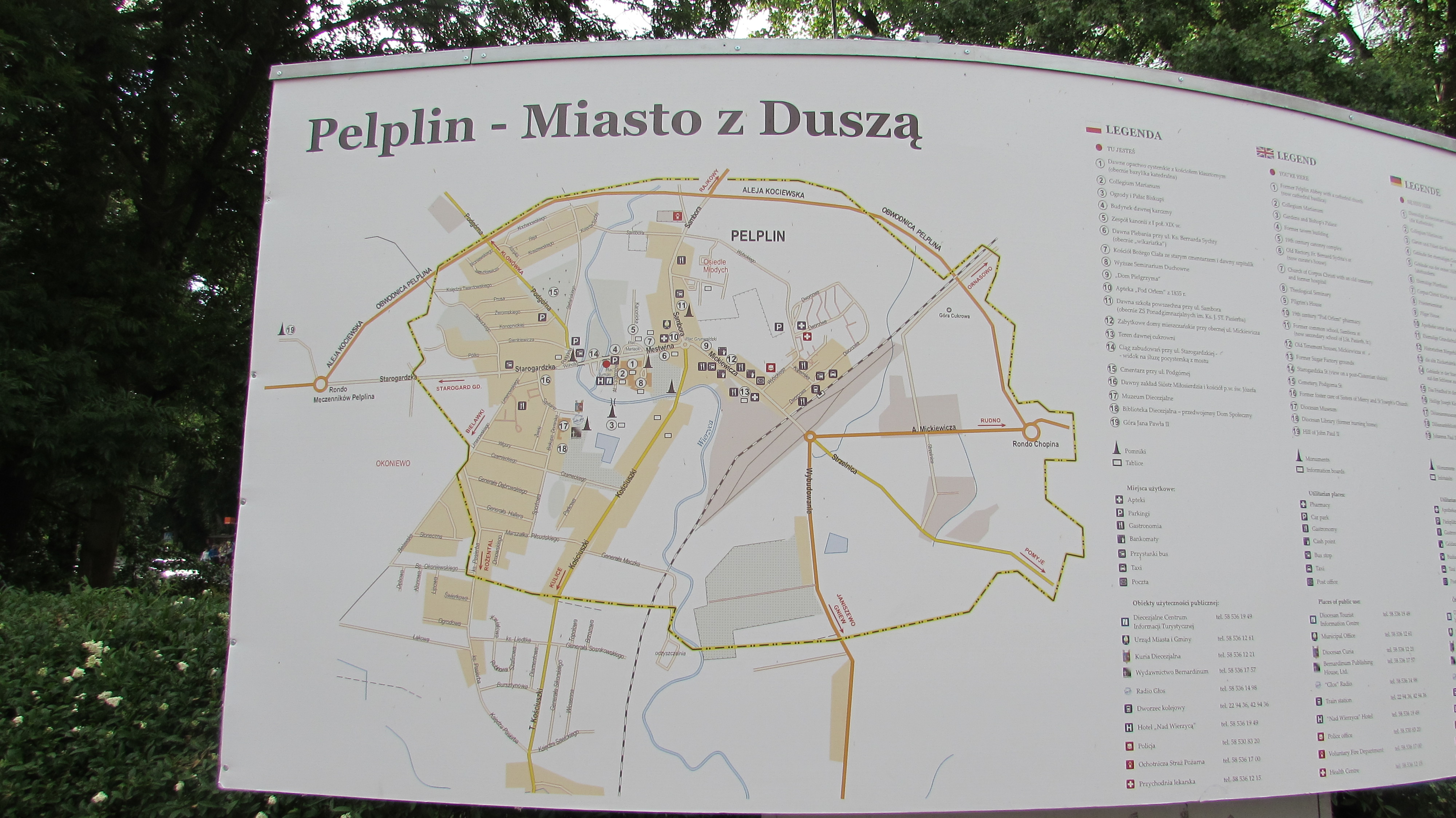 Pelplin Plan